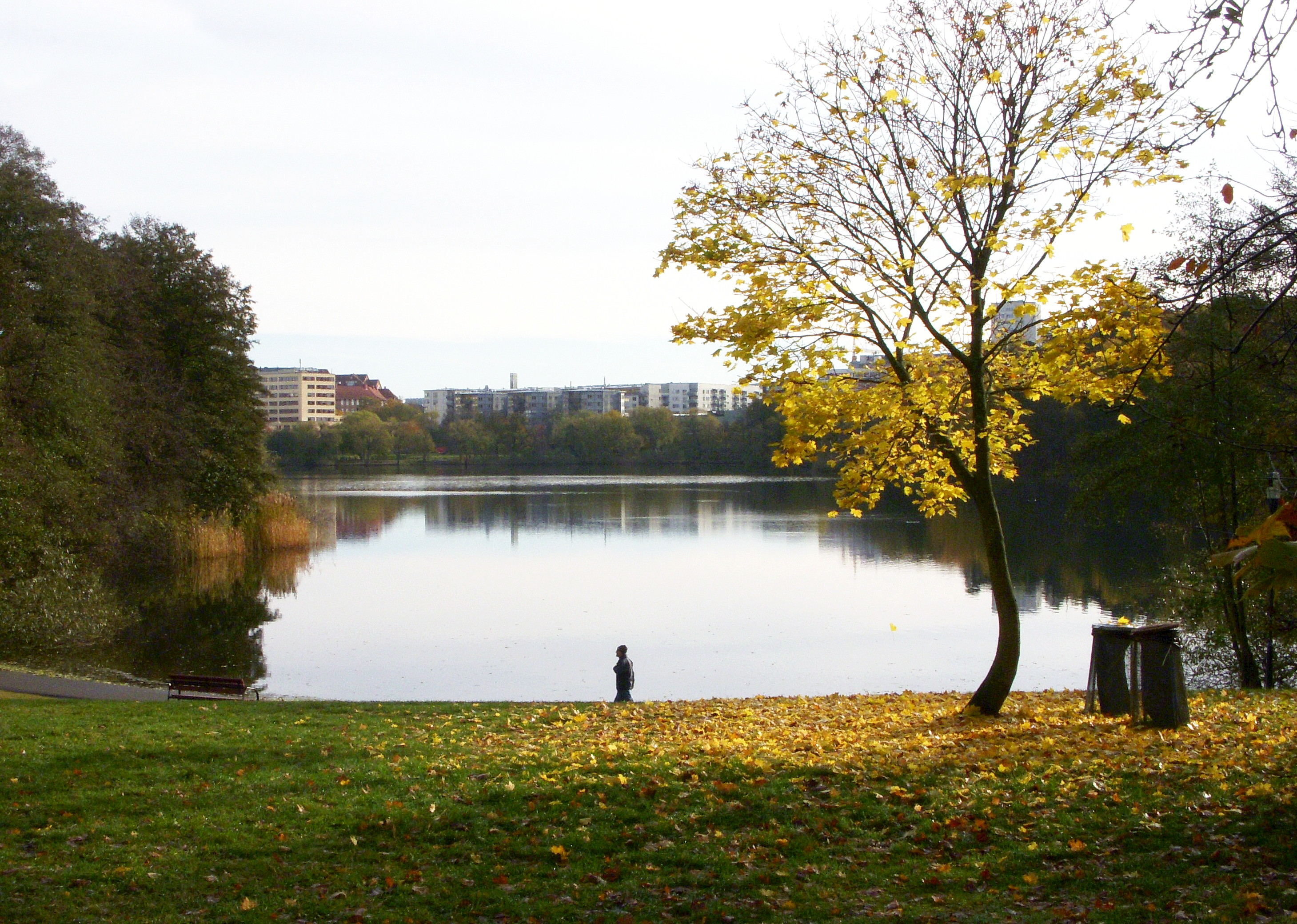 Trekantens badplats på hösten